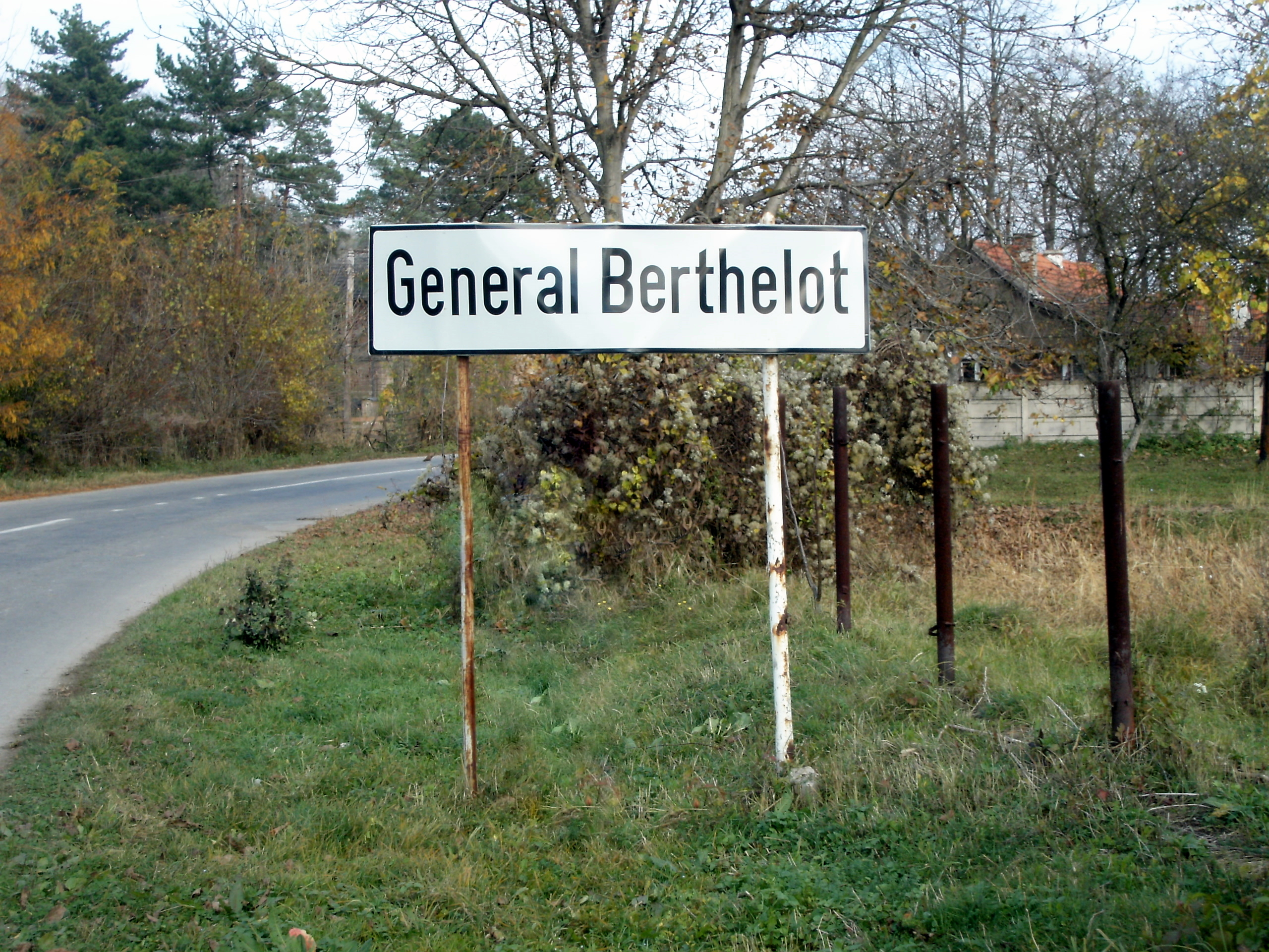 Plaque signalétrice à l'entrée du village "Général Berthelot" en Roumanie